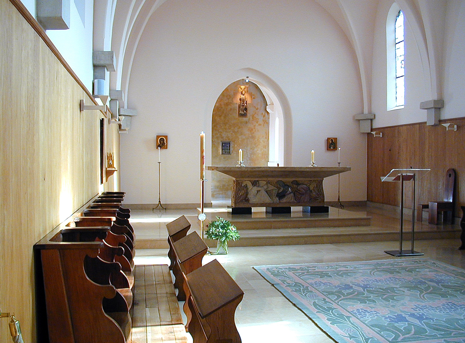 La chapelle du nouveau monastère bénédictin (Congrégation de Mont Olivet) de Mesnil-Saint-Loup (Aube).